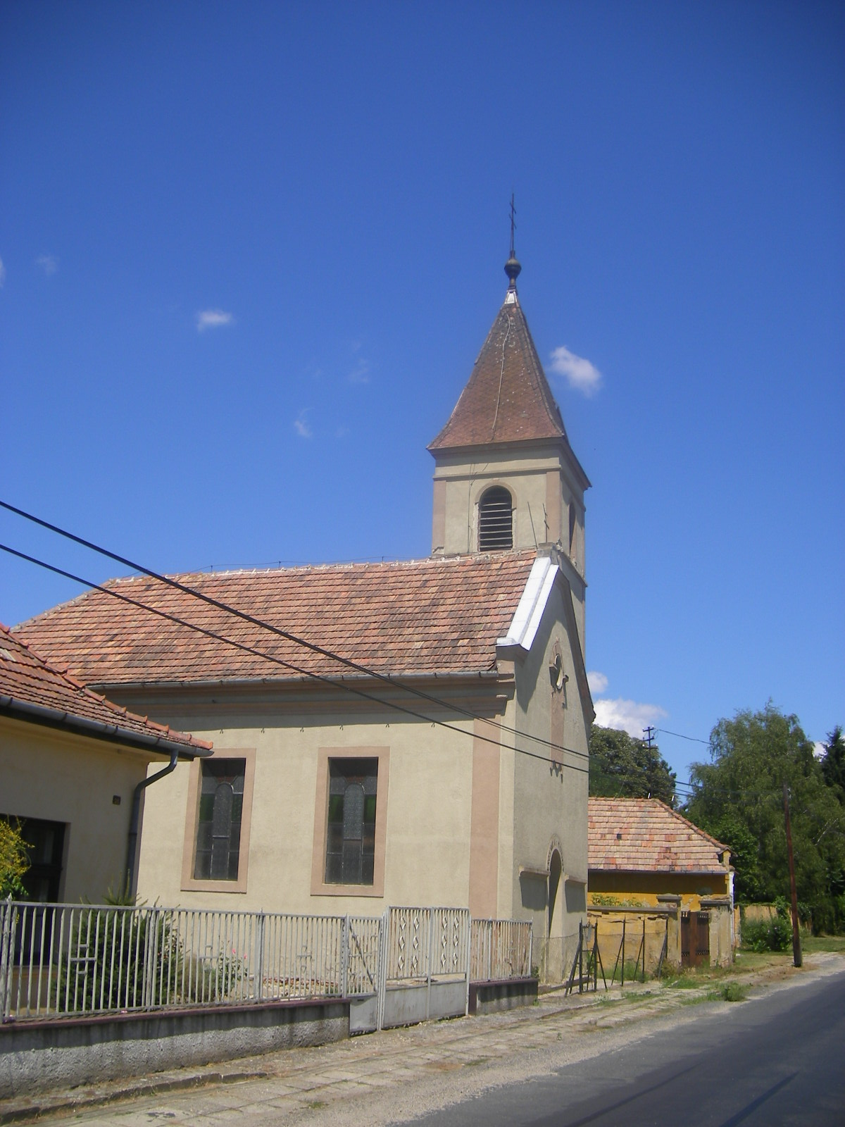 Külsővat